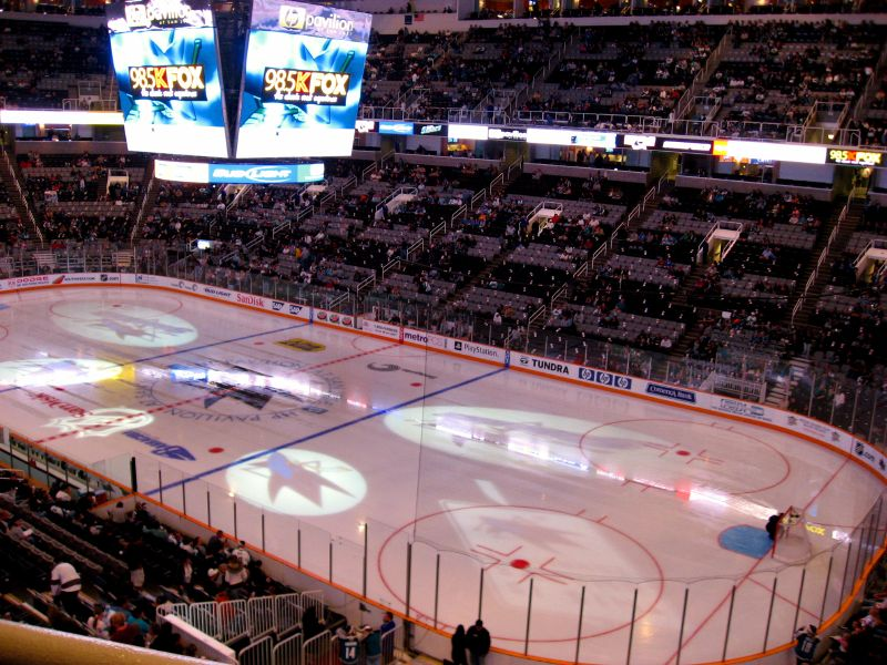 HP Pavilion